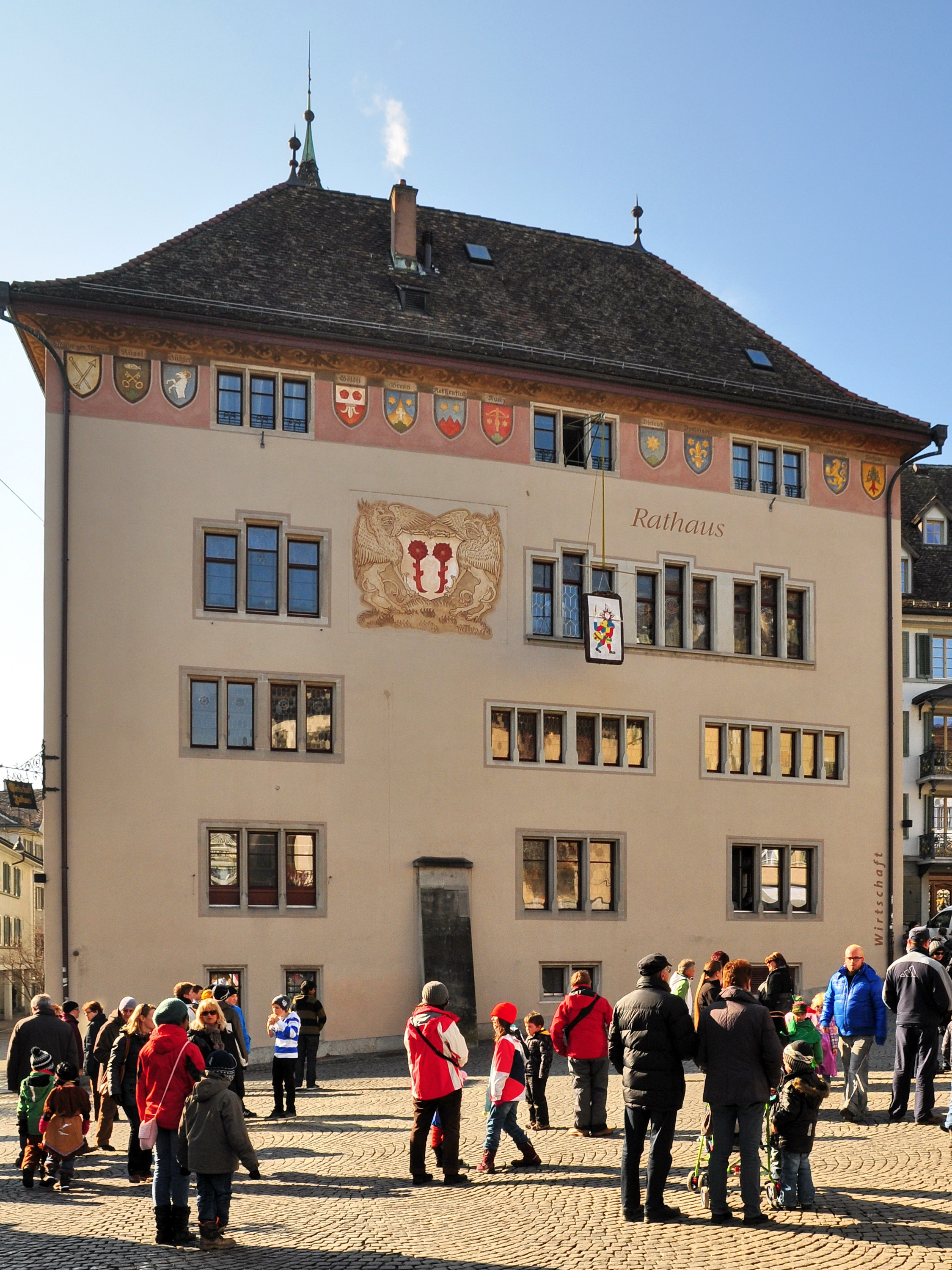 Eis-zwei-Geissebei, at Rathaus respectively Hauptplatz square in Rapperswil (Switzerland)